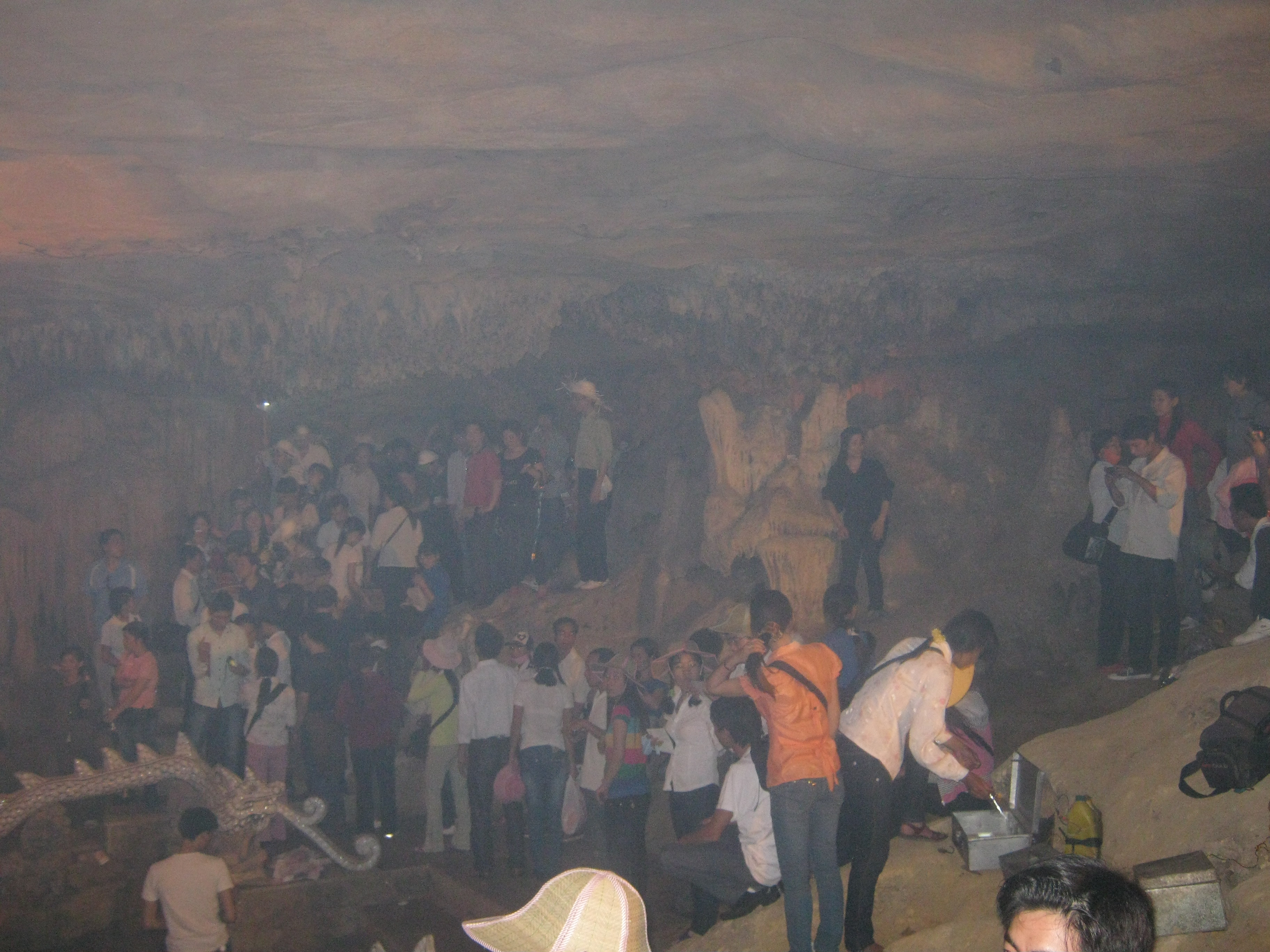 Ảnh chụp tại khu chùa Bái Đính tỉnh Ninh Bình.